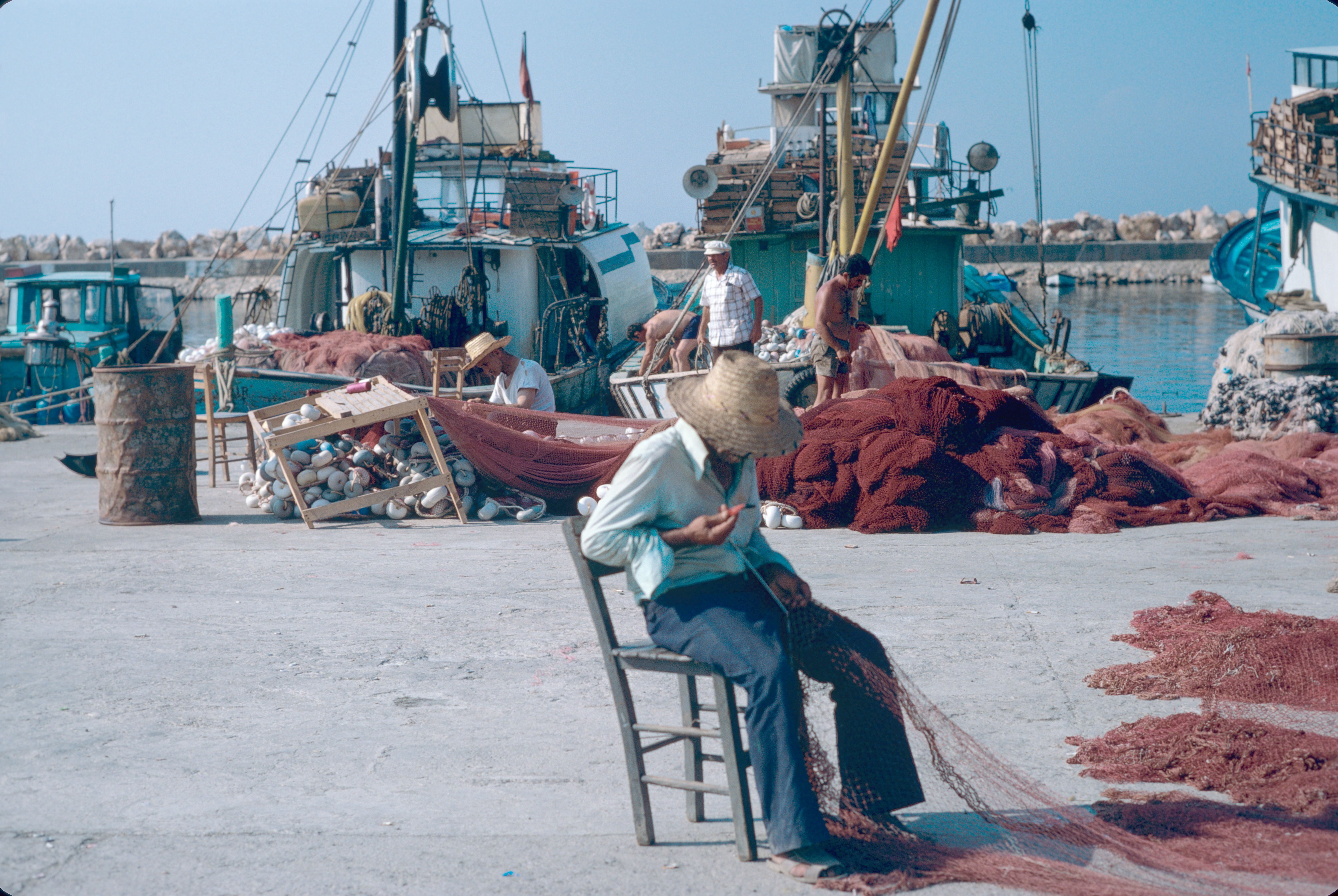 Des pêcheurs turcs en train de ramender, c'est-à-dire de raccommoder leurs sennes (bolinches, filets rectangulaires utilisés en surface pour encercler des bancs de poissons). A l'arrière plan, les deux bateaux de pêche sont des senneurs (ou bolincheurs). Güzelbahçe (golfe d'Izmir), Turquie.